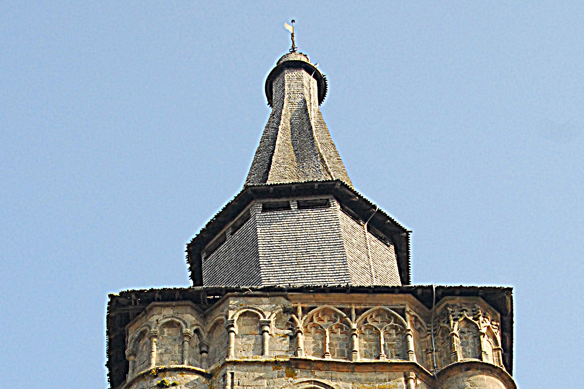 N.-D. de La Souterraine, Turmhelm von S